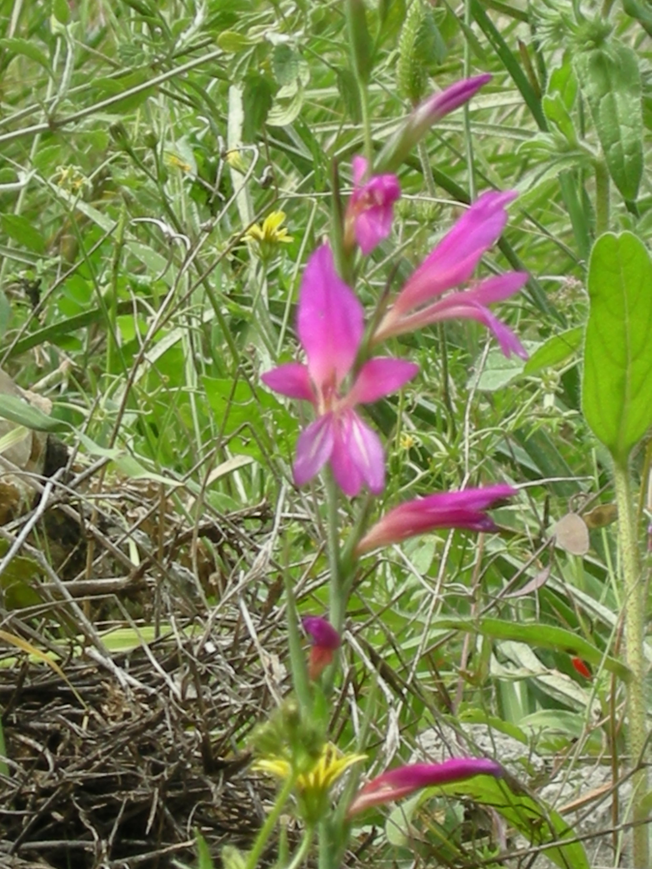 Bloom In Nahal Amud